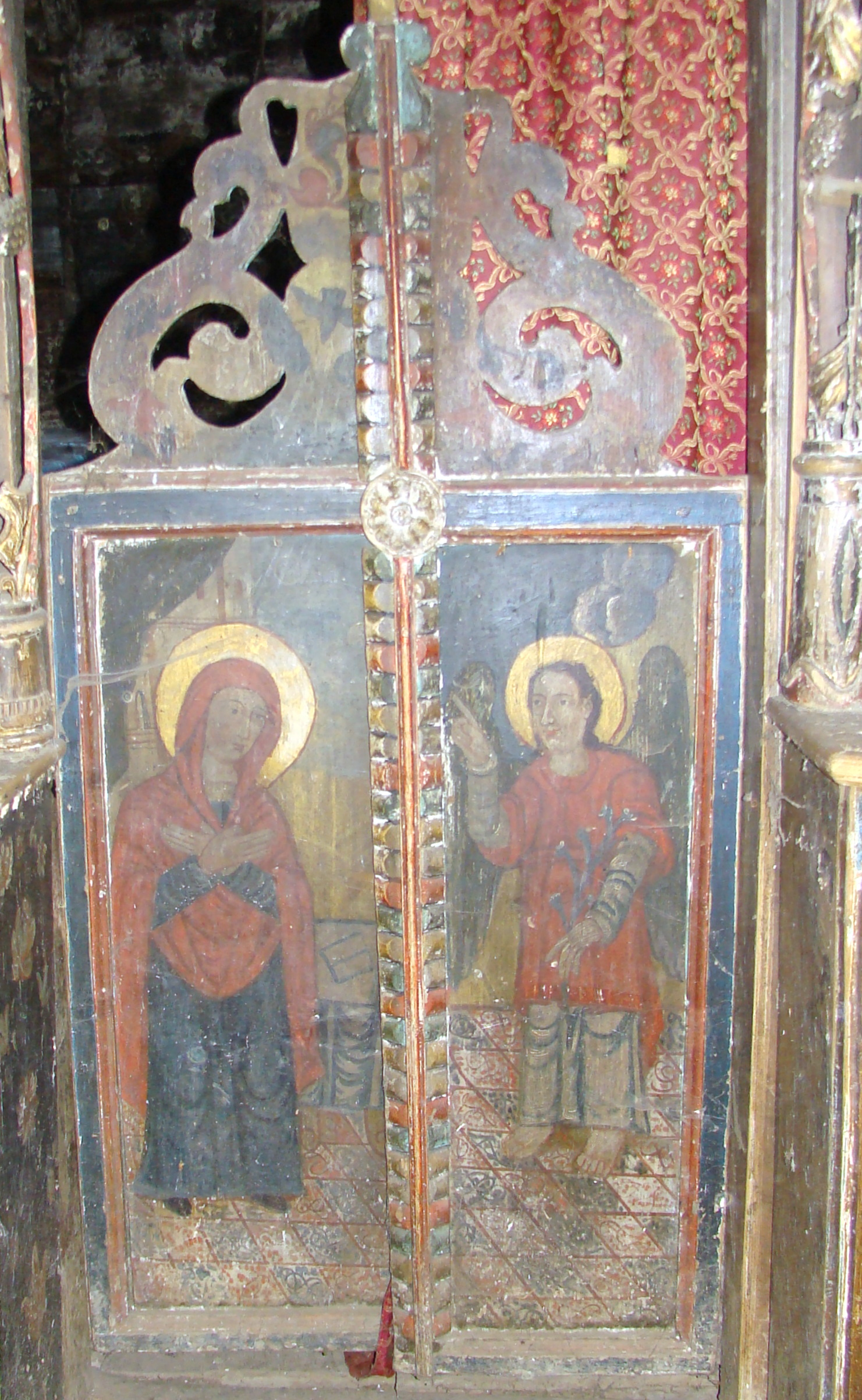 Uşile diaconeşti: Buna Vestire. Biserica de lemn „Sf. Vasile cel Mare”, sat Dragu; comuna Dragu, judeţul Sălaj